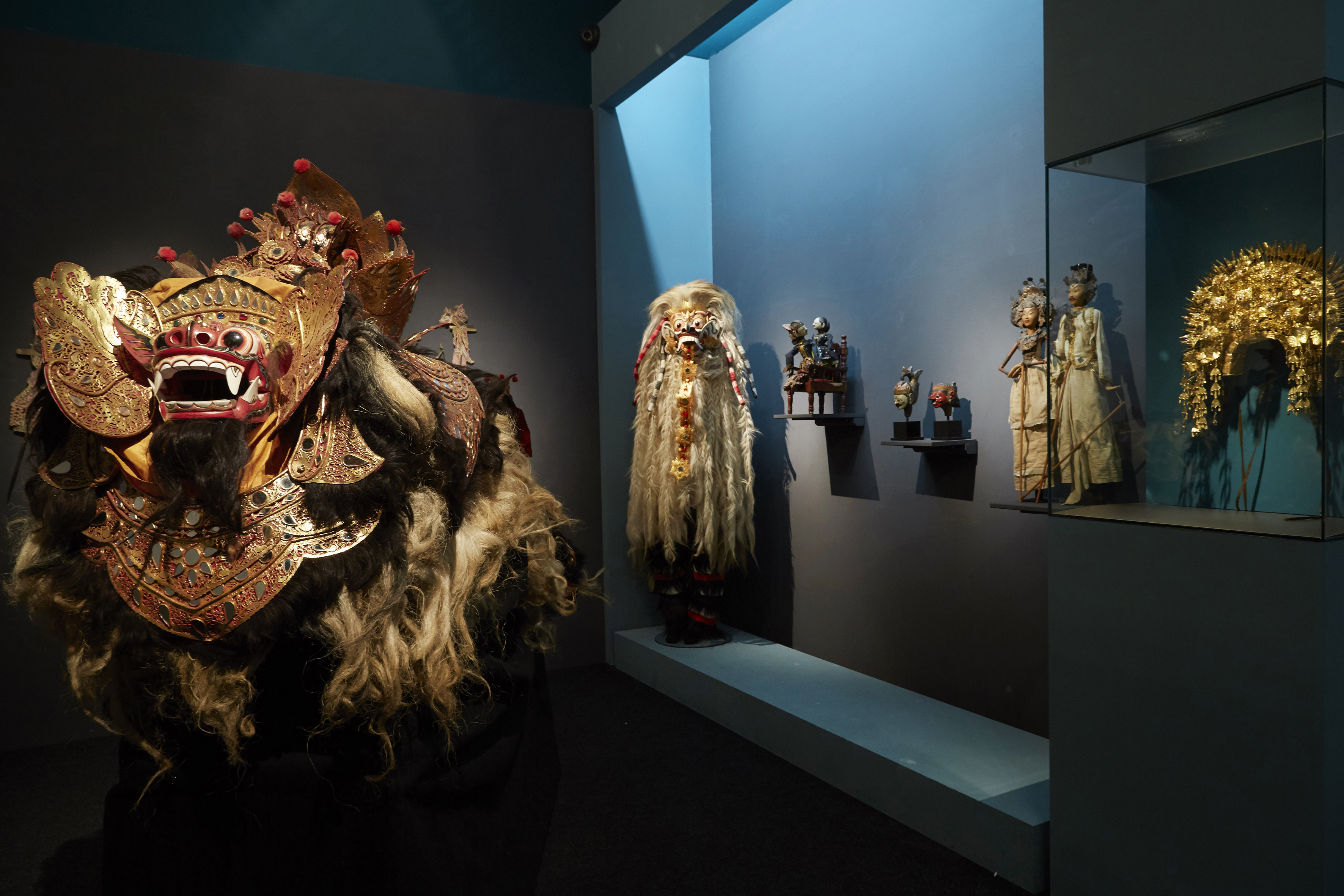 Sonderausstellung 2017